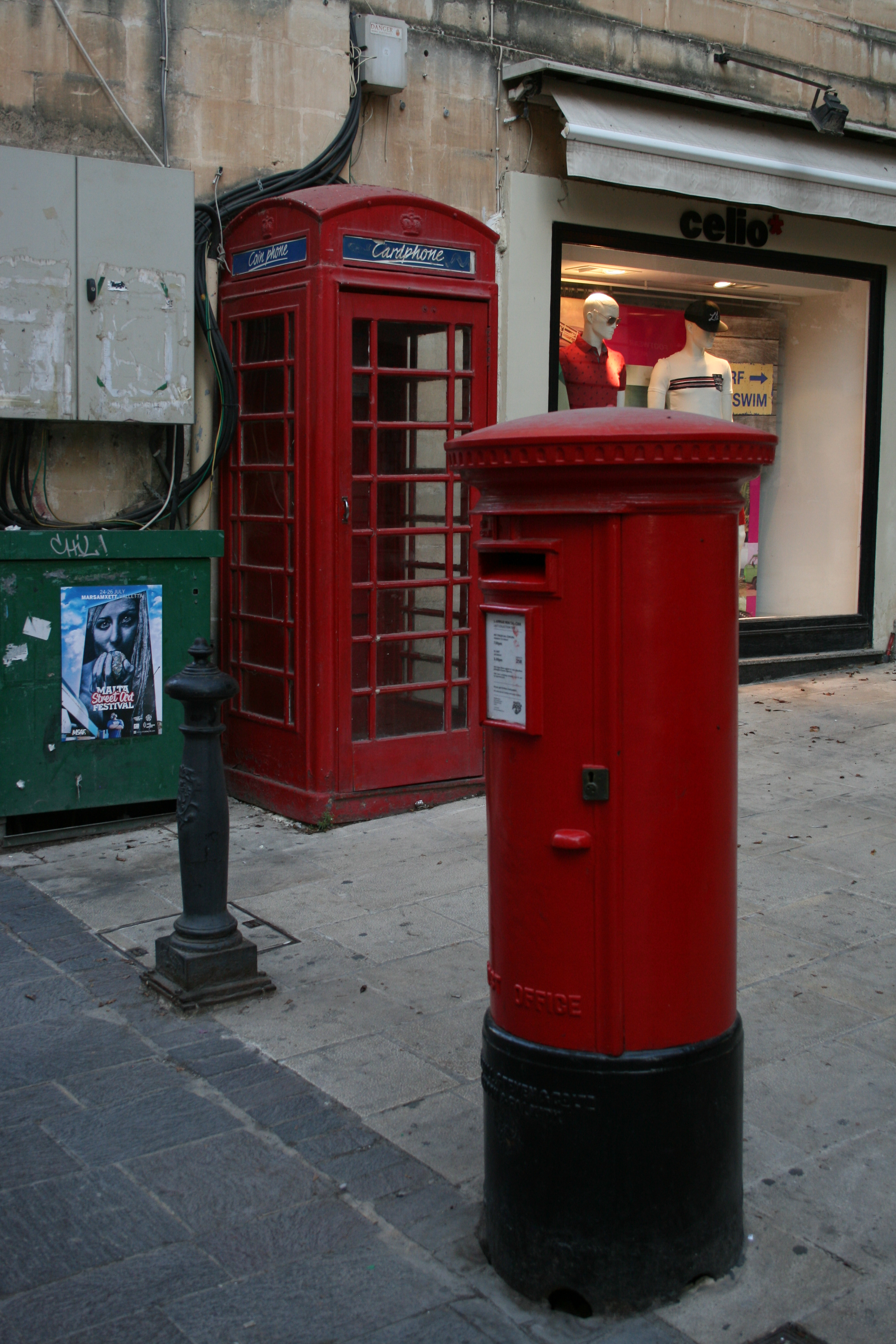 Telefonzelle und Postkasten in Valletta